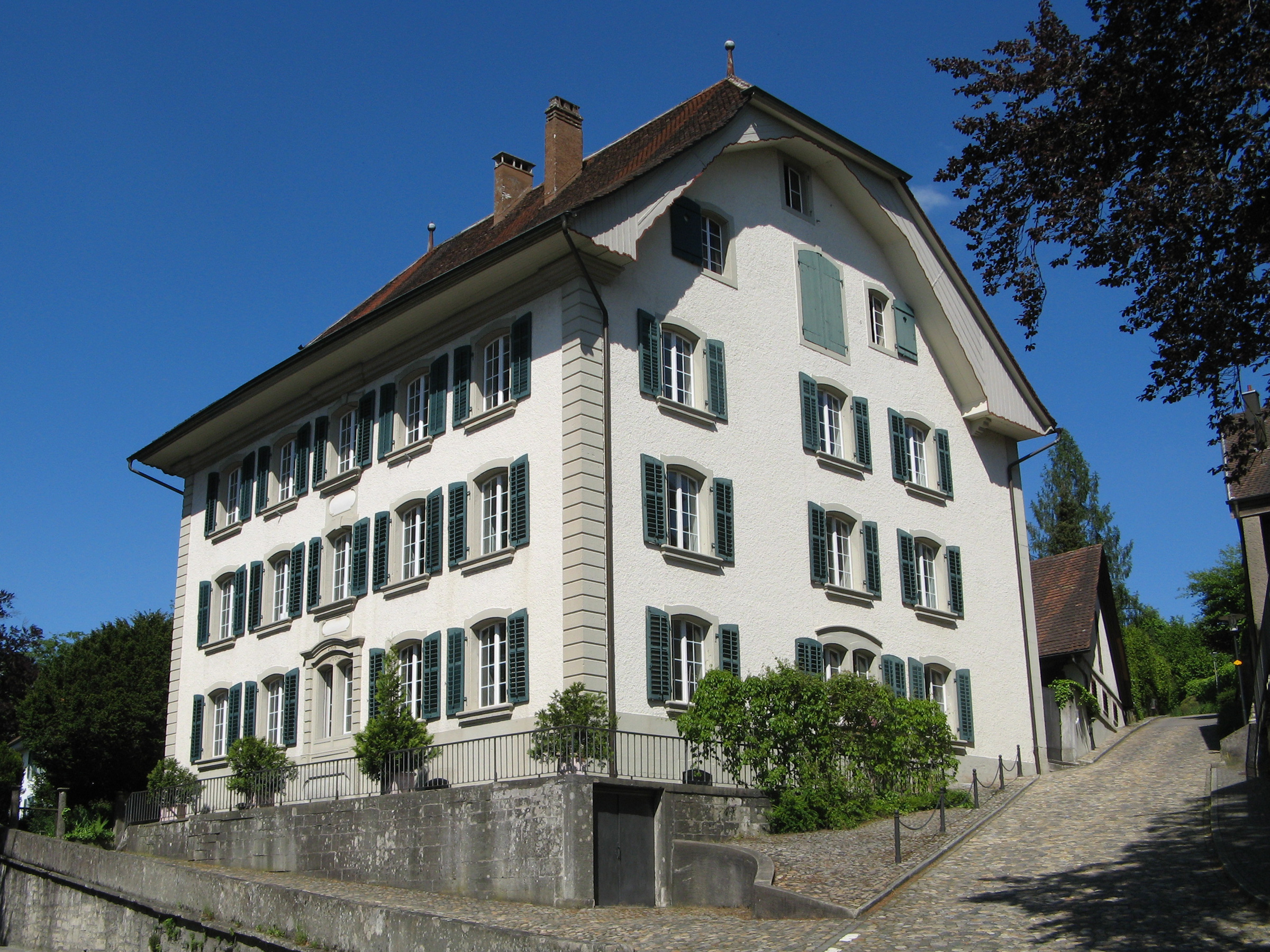 Haus am Steinbrüchliweg 1 in Lenzburg